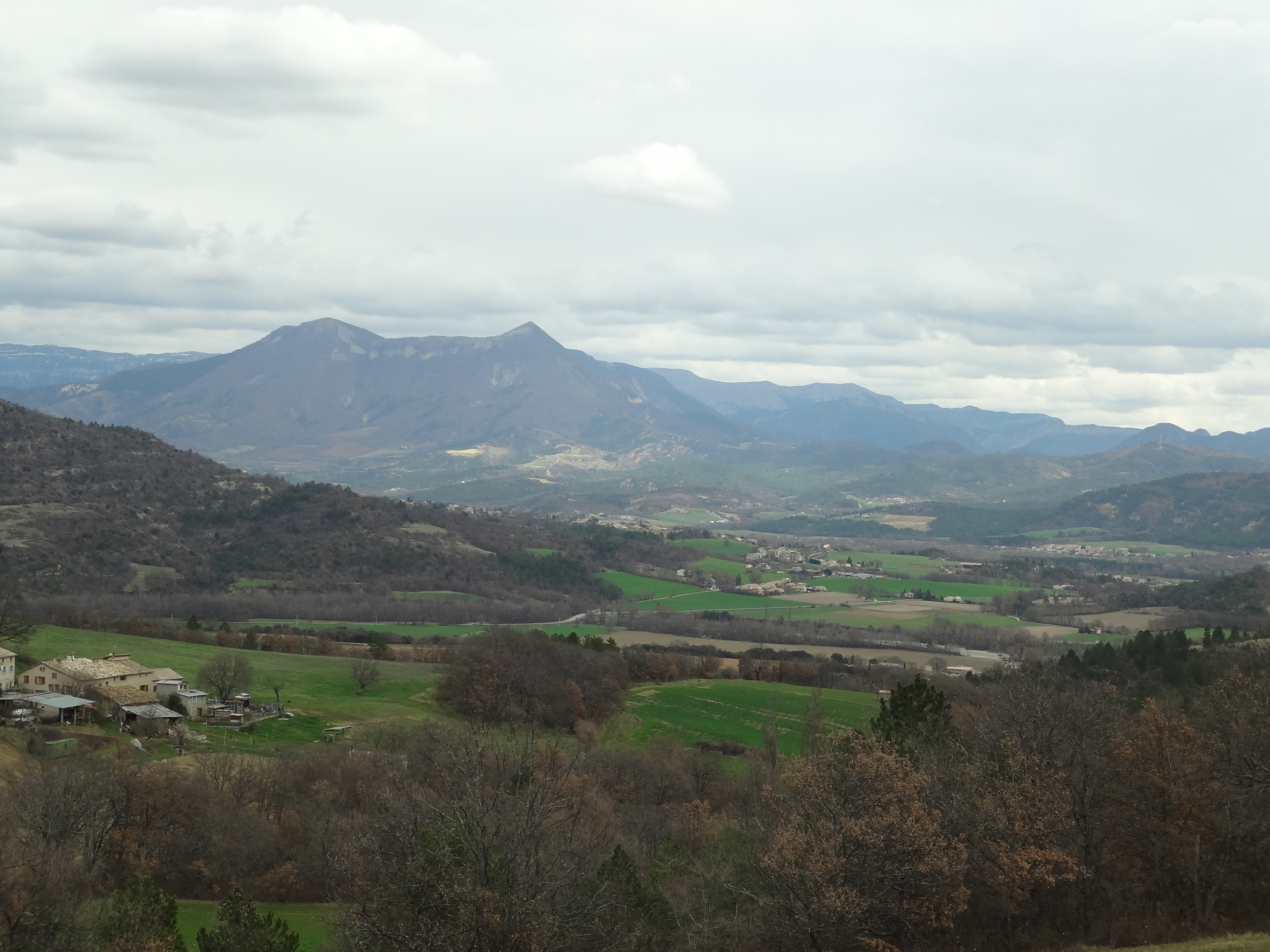 Vallée de Mirabeau et Cousson en fond, de la colline Saint-Philippe